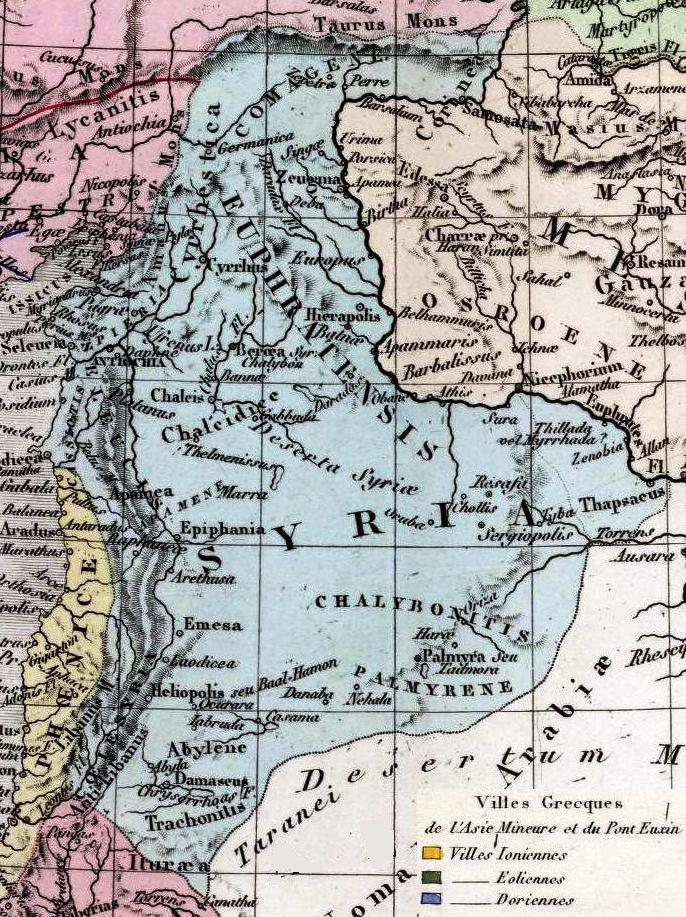 Carte Generale l'Asie Mineure de l'Armenie de la Syrie, de la Mesopotamie du Caucase & A. Atlas Universel en 67 feuilles No. 8. Dresse par A. Brue, Geographe. Reoue par E. Levasseur, Membre de l'Institut, Institut Geographique de Paris. Ch. Delagrave. Editeurs de la Societe de Geographie. 58 Rue des Ecoles. (inset) Colonies des Pheniciens. (inset) Marche de Cyrus le Jeune. (inset) Etat de l'Asie.